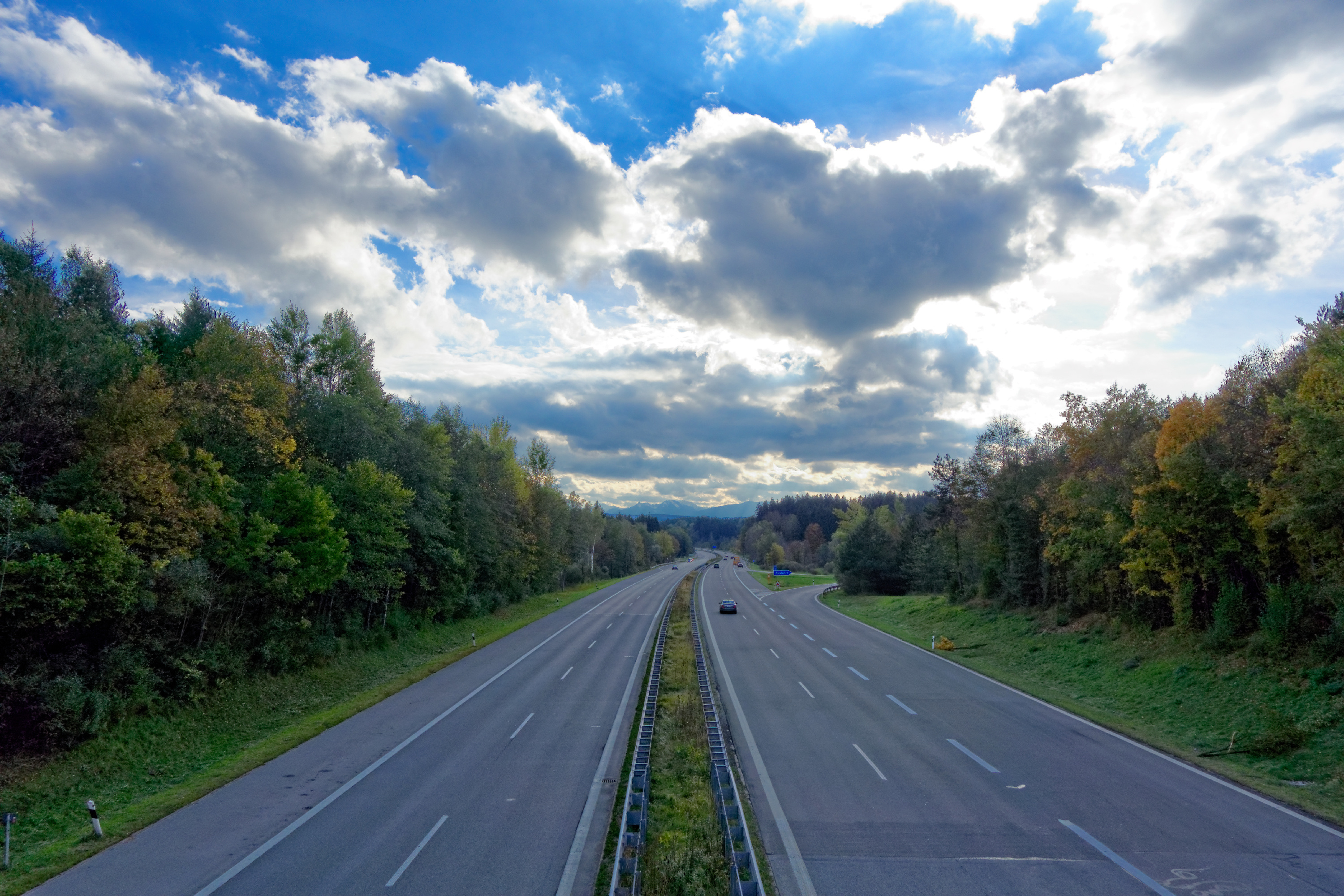 Bundesautobahn 95 vor der Ausfahrt Penzberg / Iffeldorf Richtung Garmisch-Partenkirchen